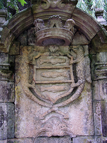 Escudo de la Familia Gayoso ubicado en el Pazo de Oca, España.